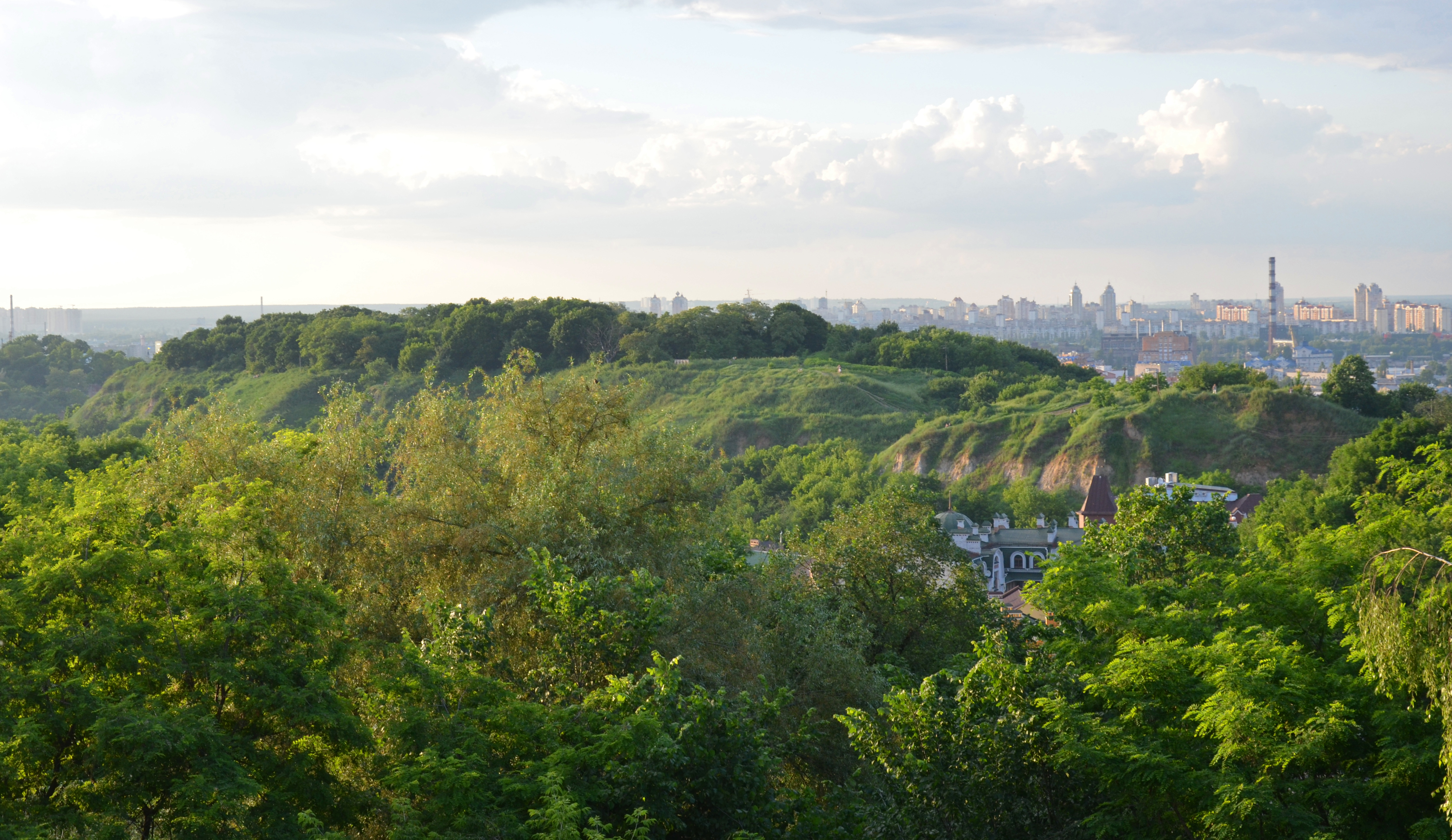 Замкова гора, Подільський район, Андріївський узвіз, Гончари-Кожум'яки, Житній ринок, Фролівський монастир